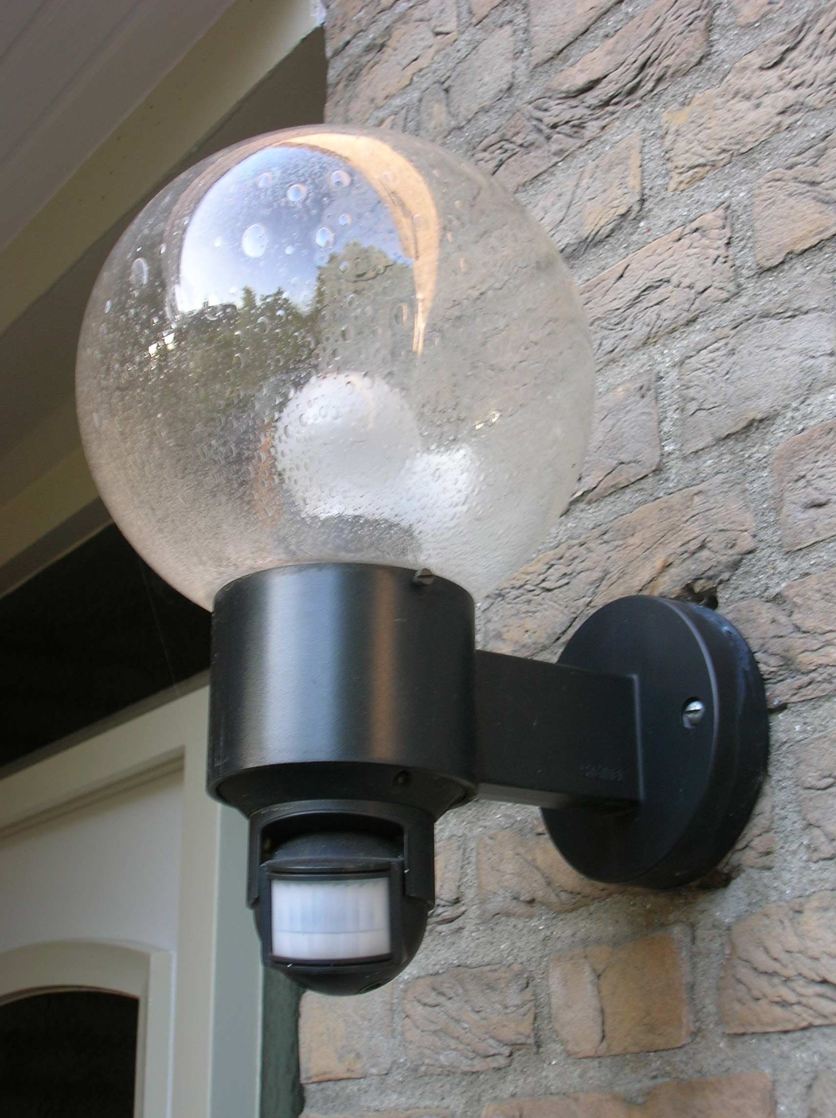 Zelfgemaakte foto, 11 juli 2006: een buitenlamp die geactiveerd wordt middels een bewegingsmelder.